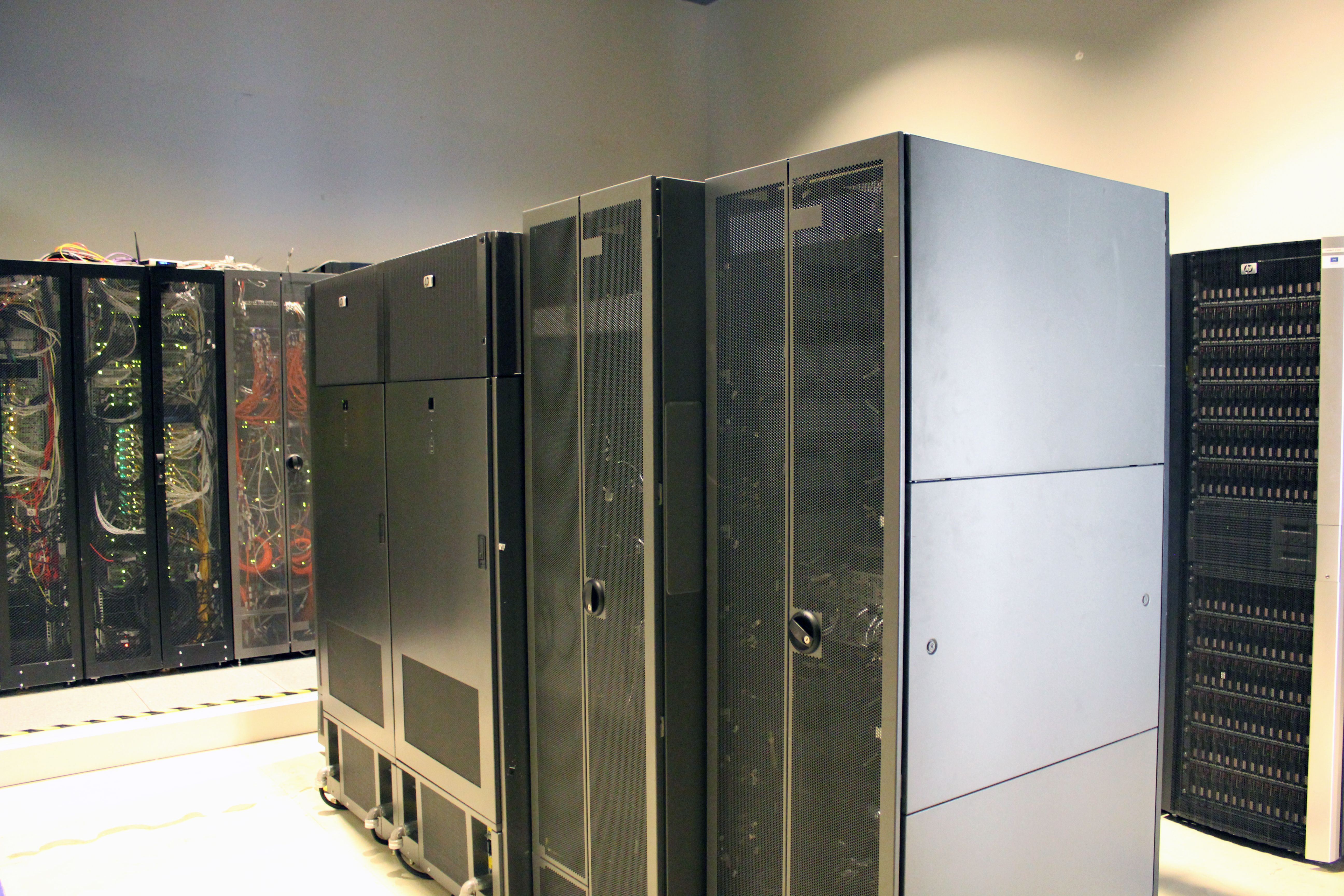 Centro de Procesamiento de Datos del Centro CénitS (Fundación COMPUTAEX), que alberga los Supercomputadores LUSITANIA y LUSITANIA II.